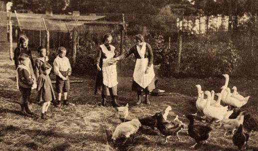 Landjugendheim Finkenkrug